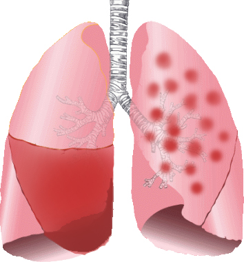 ബ്രോങ്കോന്യുമോണിയയും ലോബാർ ന്യുമോണിയയും തമ്മിലെ വ്യത്യാസം കാണിക്കുന്ന ചിത്രം : ശ്വാസകോശത്തിന്റെ ഒരു പാളിയെ (lobe) മുഴുവനായി ബാധിക്കുന്ന ന്യുമോണിയ ആണ് ലോബാർ ന്യുമോണിയ (ചിത്രത്തിൽ ഇടതു വശത്ത്). ബ്രോങ്കോന്യുമോണിയയിൽ അണുബാധയും തുടർന്നുള്ള നീർവീക്കവും കോശജ്വലനവും ശ്വാസകോശത്തിൽ ചെറുതുണ്ടുകളായിട്ടാണ് (patches) കാണപ്പെടുന്നത് (ചിത്രത്തിൽ വലതു വശത്ത്). സൂചിക: ശ്വാസനാളം (trachea); ശ്വാസകോശം (Lung); ശ്വാസകോശപാളികൾ (lobes of the lung). ശ്വസനി (Bronchus) ശ്വസനിക (Bronchioles)